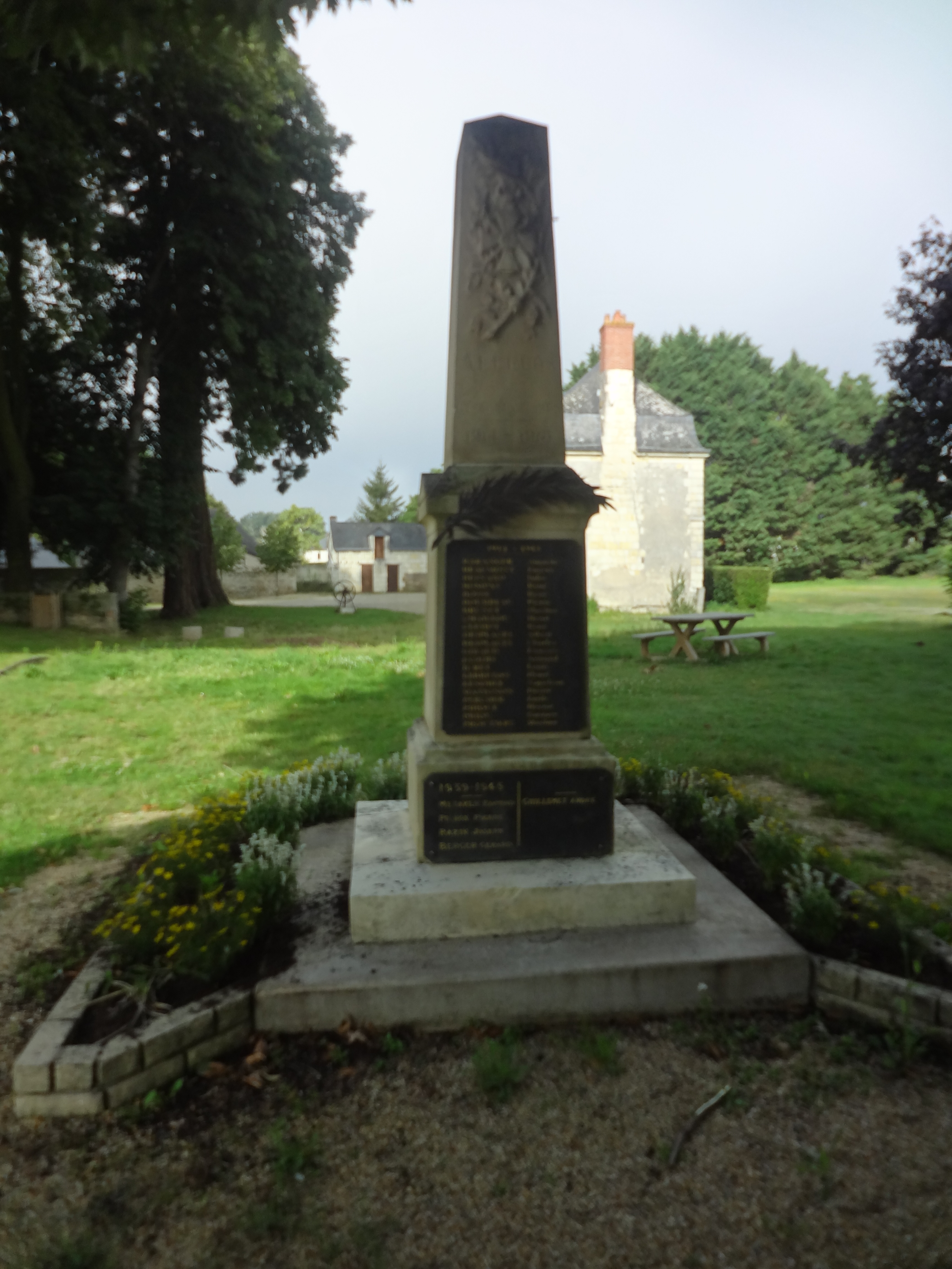 Monument aux morts des Alleuds (Maine-et-Loire, France).